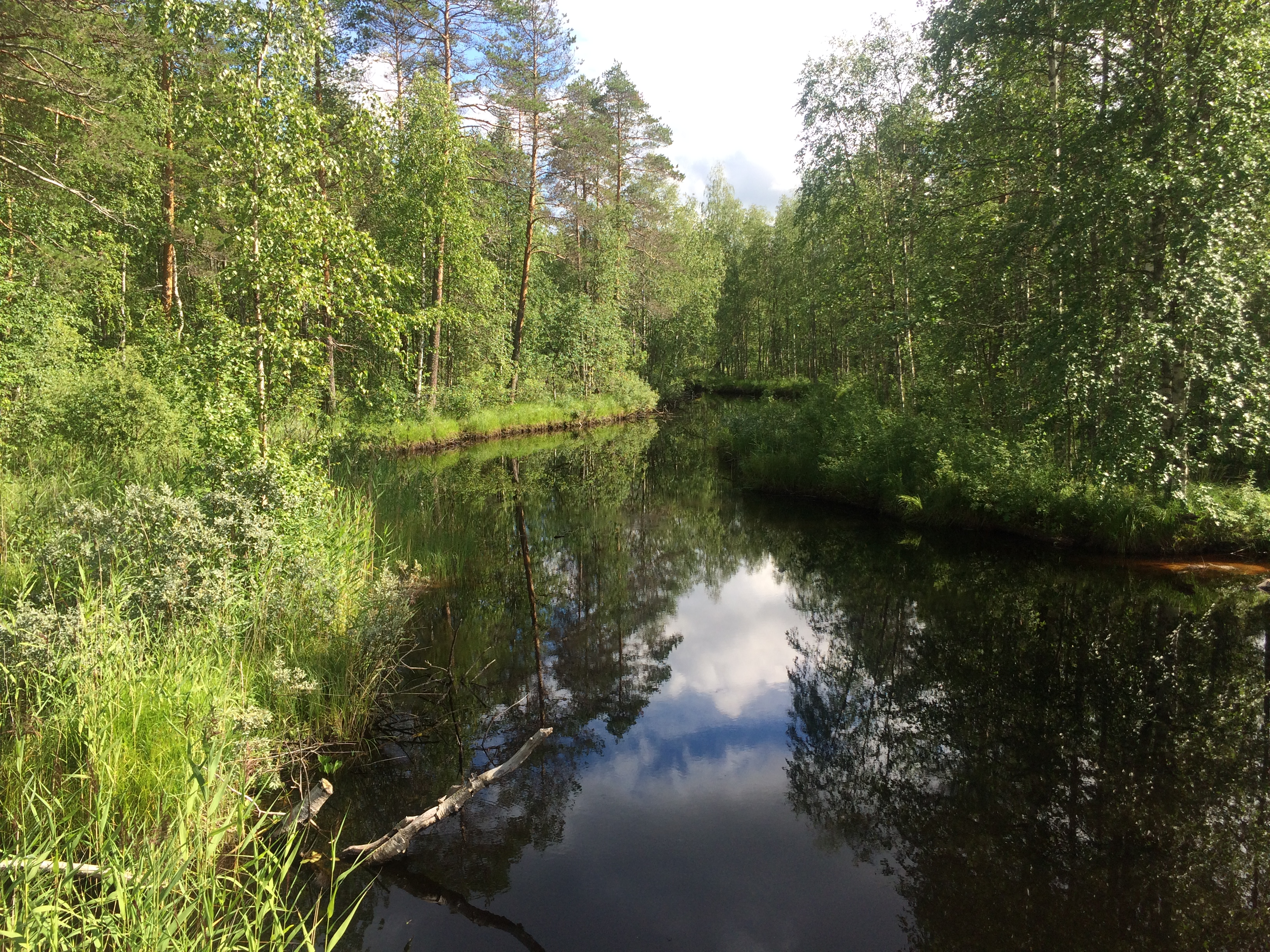 Судак (река, впадает в Сямозеро)